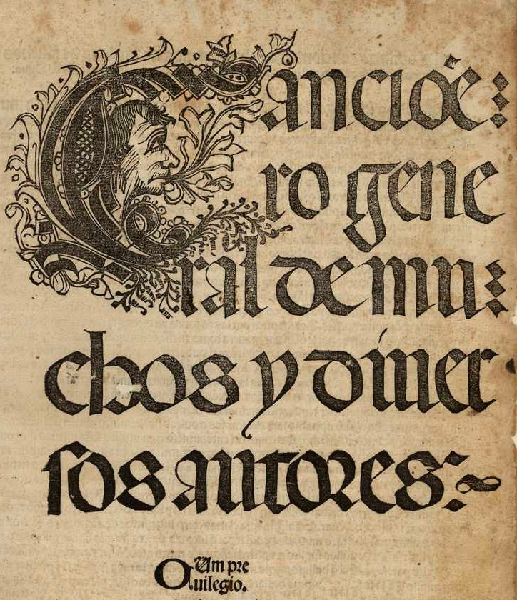 Portada del Cancionero general de muchos y diversos autores, Valencia, Cristobal Cofman, 1511. Compilado por Hernando del Castillo.